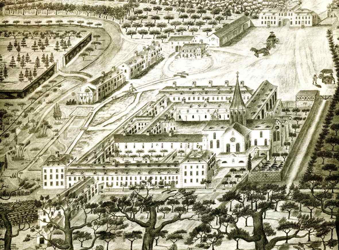 Kloster Arnsburg bei Lich, Hessen, Deutschland, kolorierte Darstellung vom Jahr 1808